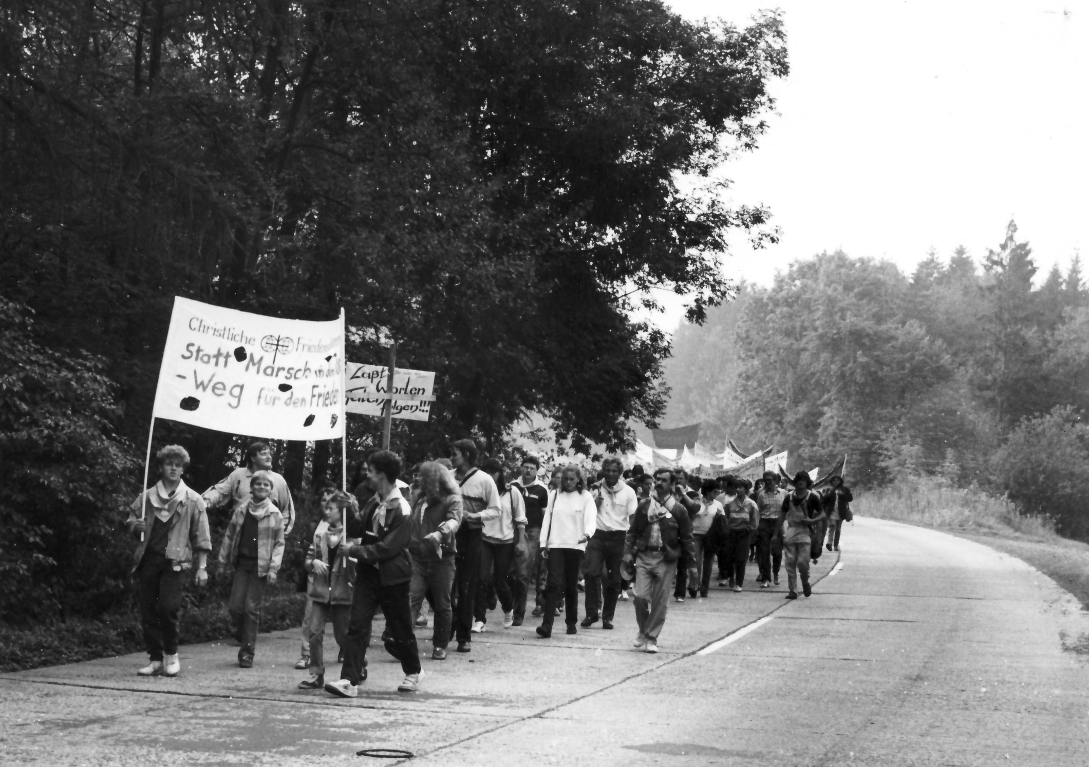 Teilnehmer des Olof-Palme-Marschs